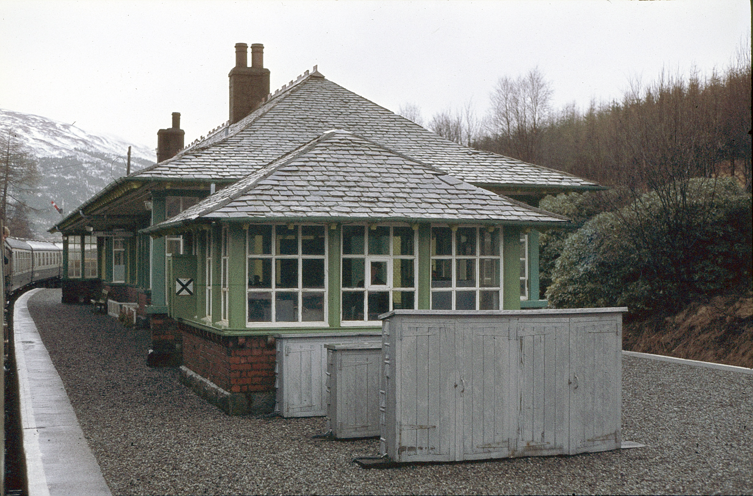 March 1982